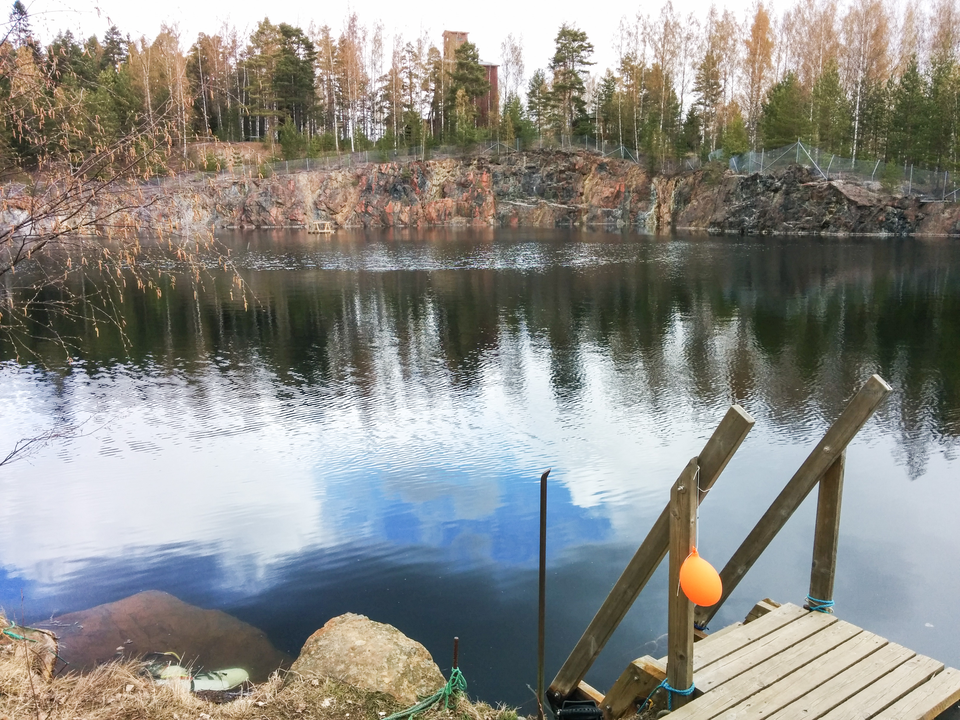 Haverin louhos nykytilassaan.